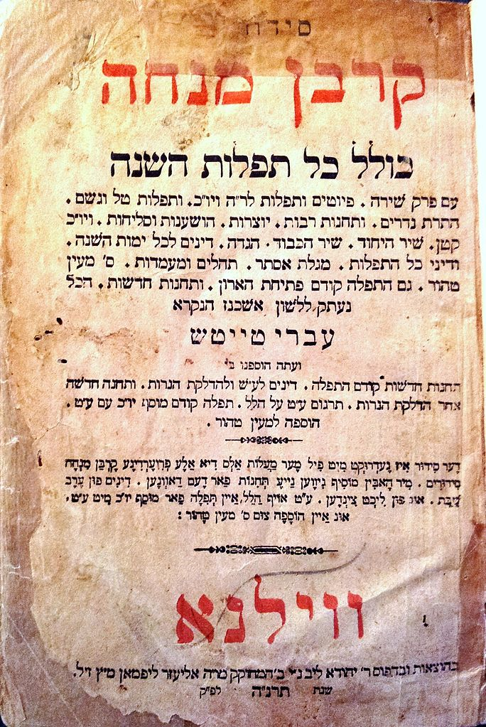 שער סידור קרבן מנחה